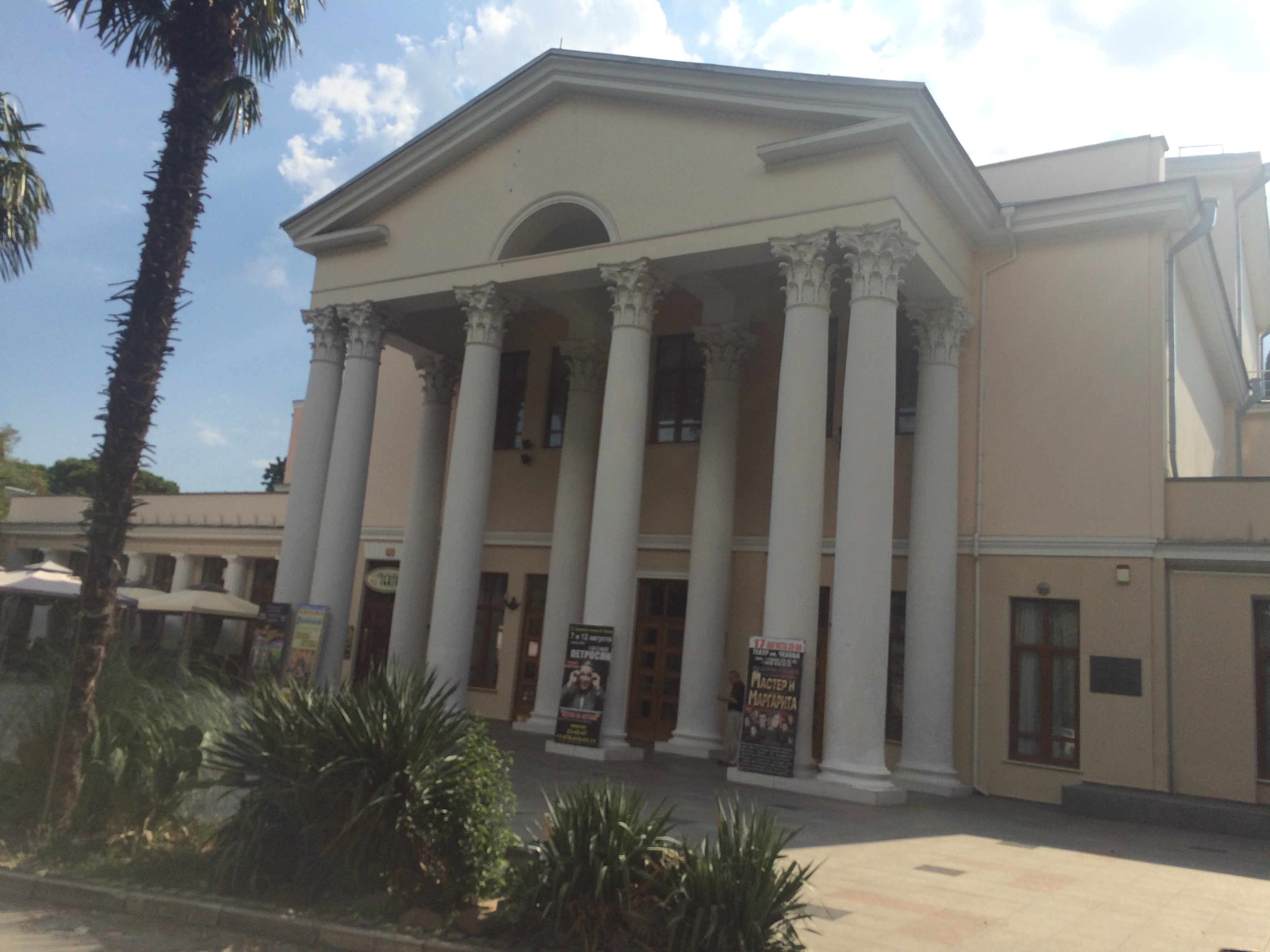 Здание городского театра им. А.П.Чехова: улица Екатерининская, 13, литер "А", Ялта, Крым This object is located on the Crimean Peninsula and recognized as cultural heritage by Russia under the monument ID: 8231531000. The legal status of the Crimean region is currently disputed.